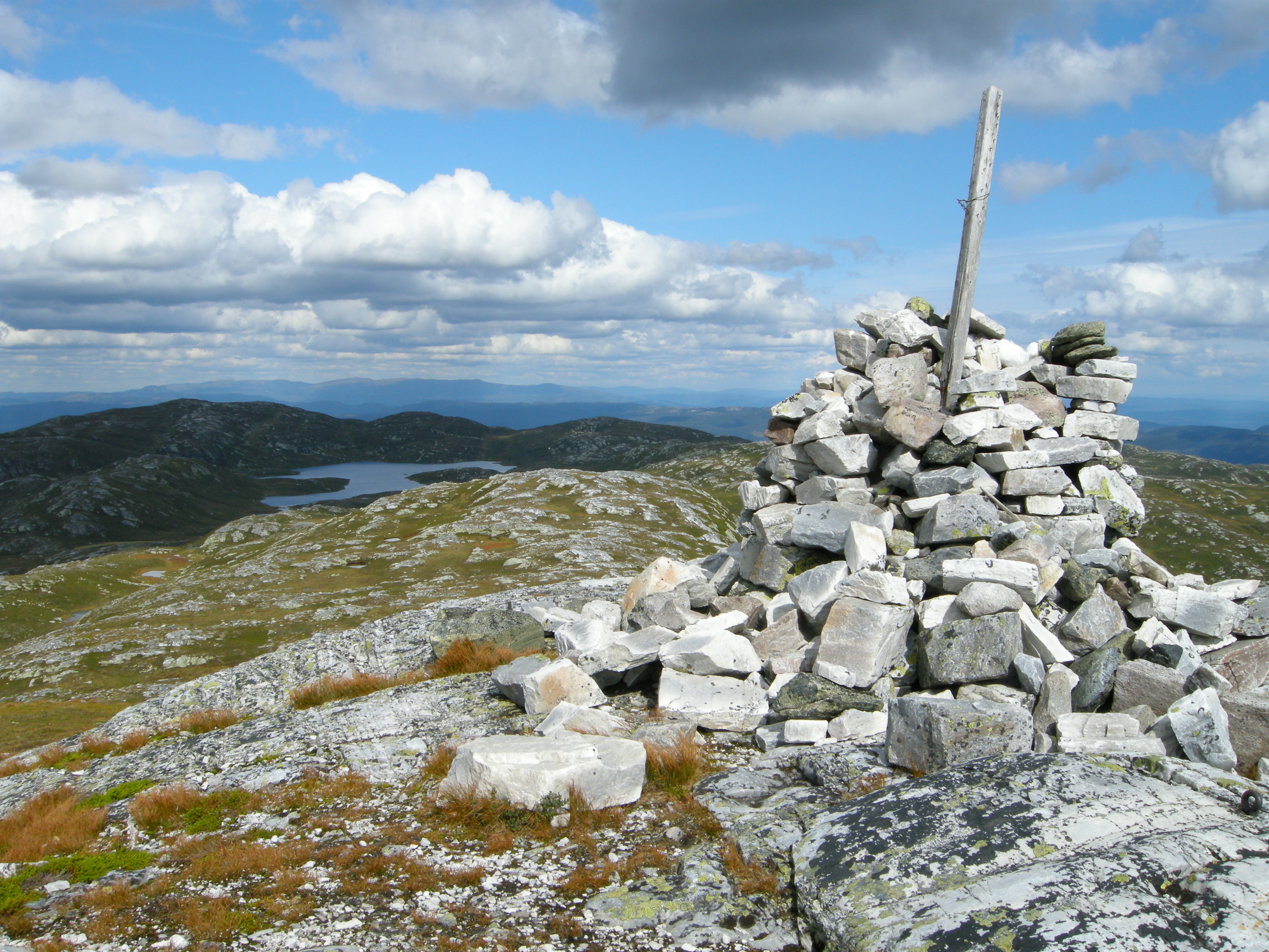 På toppen av Åklinuten